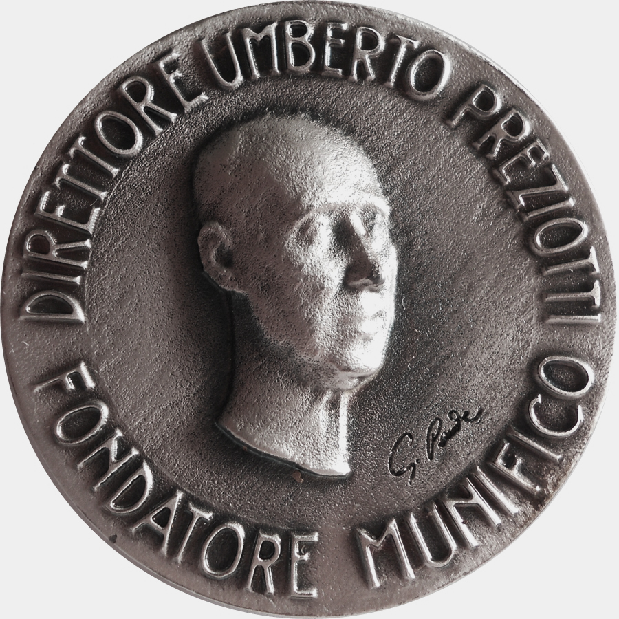 Medaglia argentea del preside Umberto Preziotti coniata nel cinquantesimo anniversario della fondazione dell'Istituto Arte Umberto Preziotti